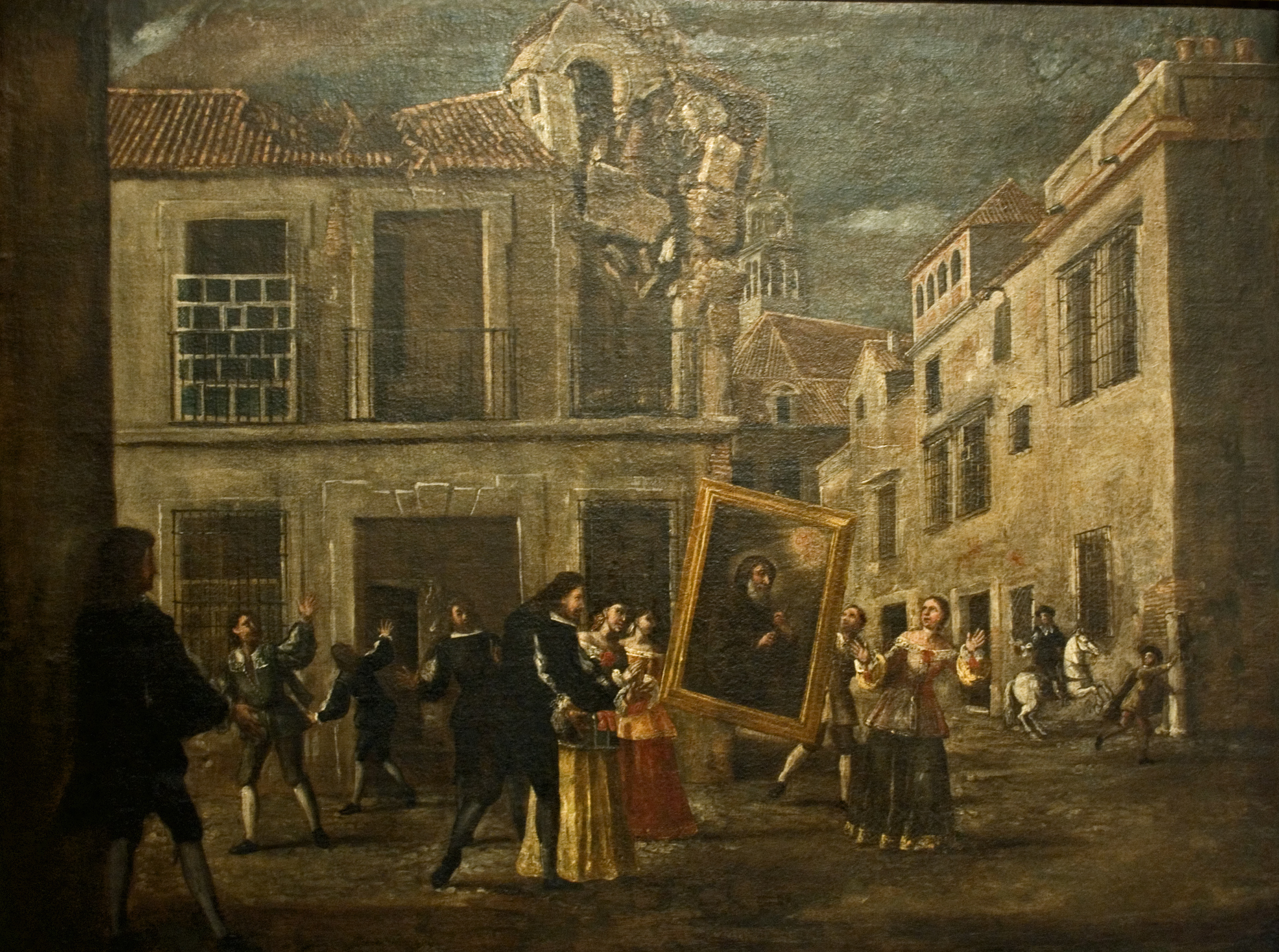 Este lienzo representa el momento en que, durante un terremoto ocurrido en alguna ciudad no identificada, el seismo se detuvo por la intercesión de la imagen de San Francisco de Paula. Se desconoce con exactitud que milagro representó en este lienzo Lucas Valdés, ya que la literatura sobre la vida del santo no narra ningún milagro vinculado a un terremoto.